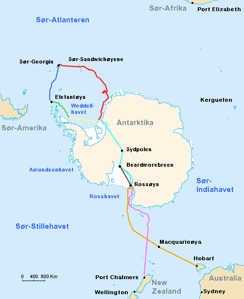 Kart over sjørutene til no:«Endurance», «James Caird» og «Aurora», forsyningsruten til Rosshavsgruppen og den planlagte ruten til Weddellhavet for gruppen ledet av Ernest Shackleton på hans Endurance-ekspedisjon i 1914–15: «Endurance»s ferd «Endurance»s drift i pakkisen Sjødriften etter at «Endurance» sank «James Caird»s ferd Planlagt trans-antarktisk rute «Aurora»s ferd mot Antarktika «Aurora»s tilbakeferd Forsyningsrute